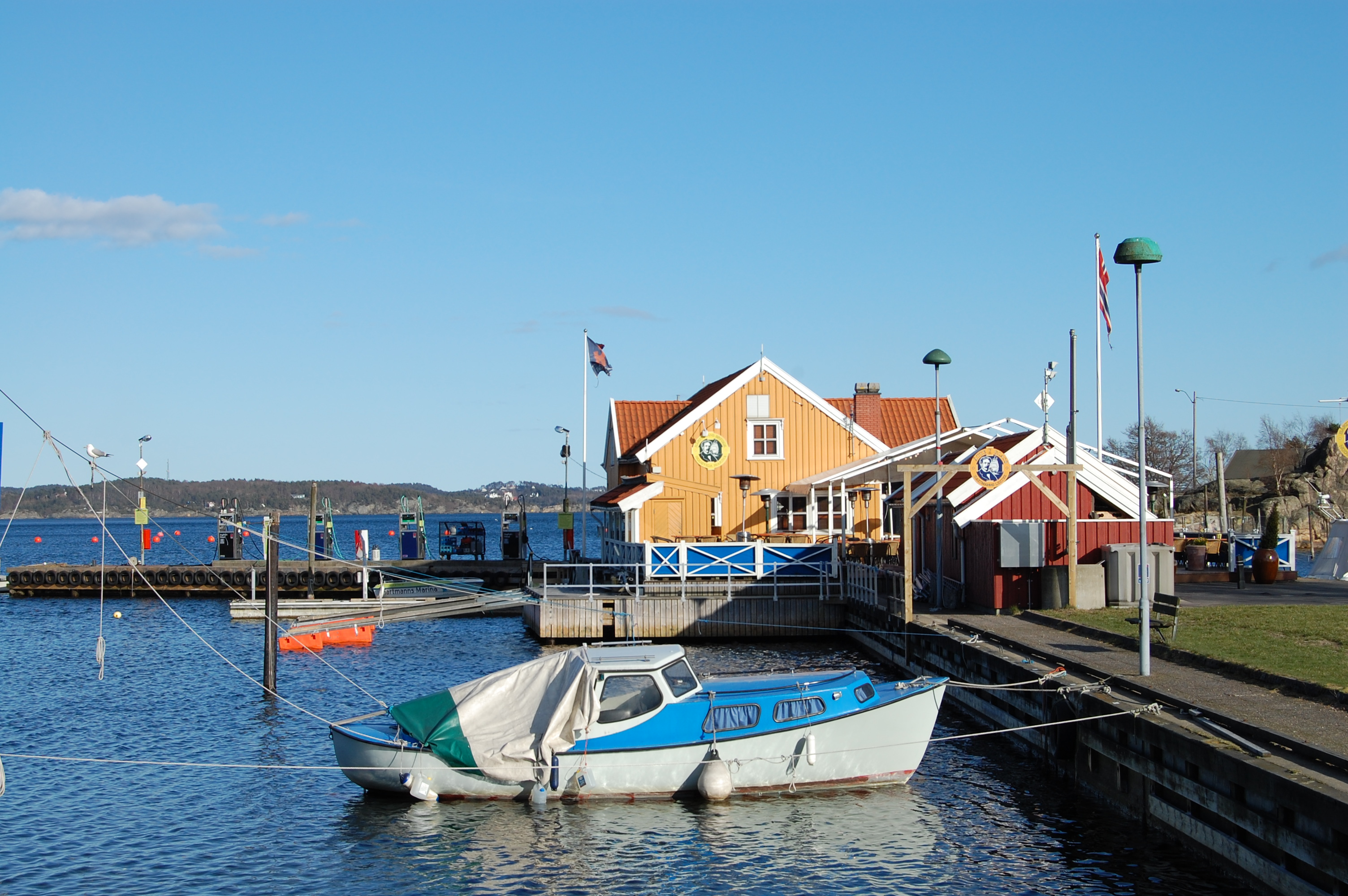 Hartmanns brygge